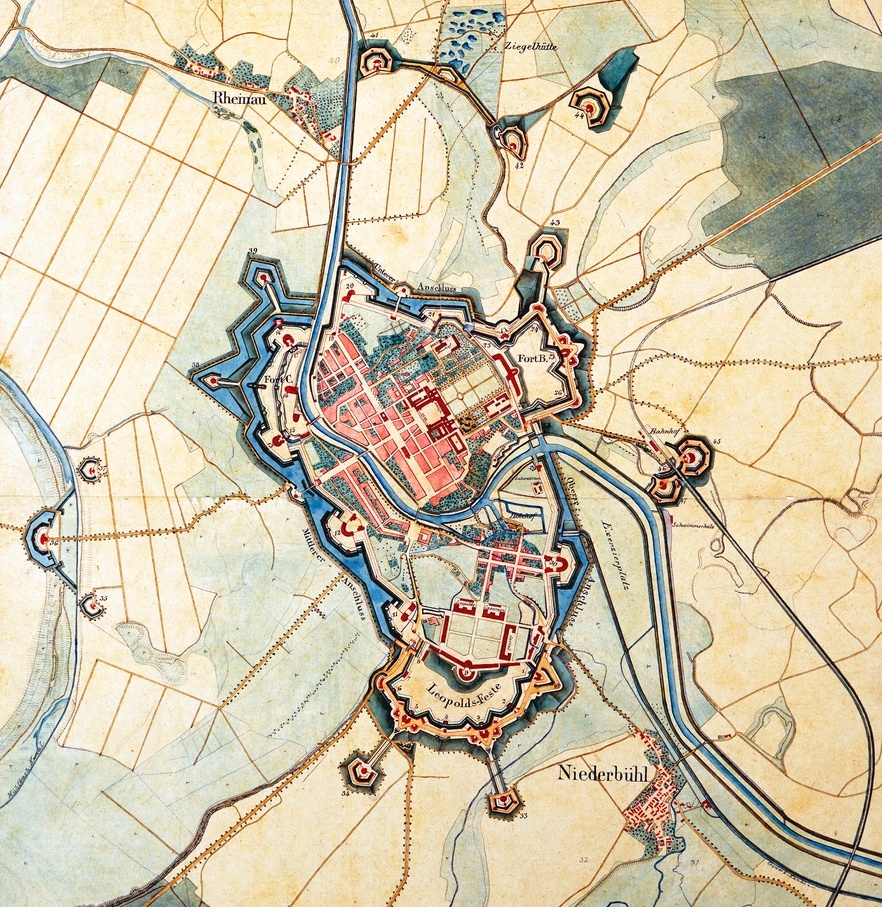 Festung Rastatt 1849, Ausschnitt aus Situationsplan von Rastatt und Umgebungen nach 1:10 000 Verjüngung. Plan der Festung. Schefold 32214 Stadtarchiv/Stadtmuseum Rastatt.